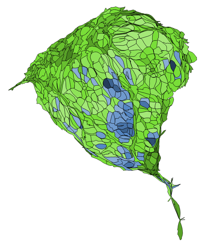 中文（台灣）: 顏色對照表